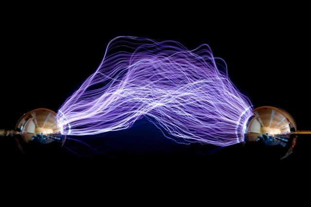 Experiment EBM Lernwelt Energie